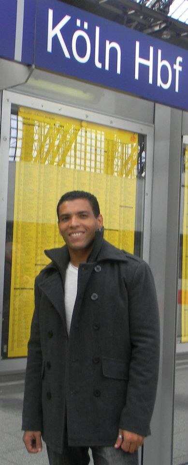 Foto de Marcus Paulo de oliveira